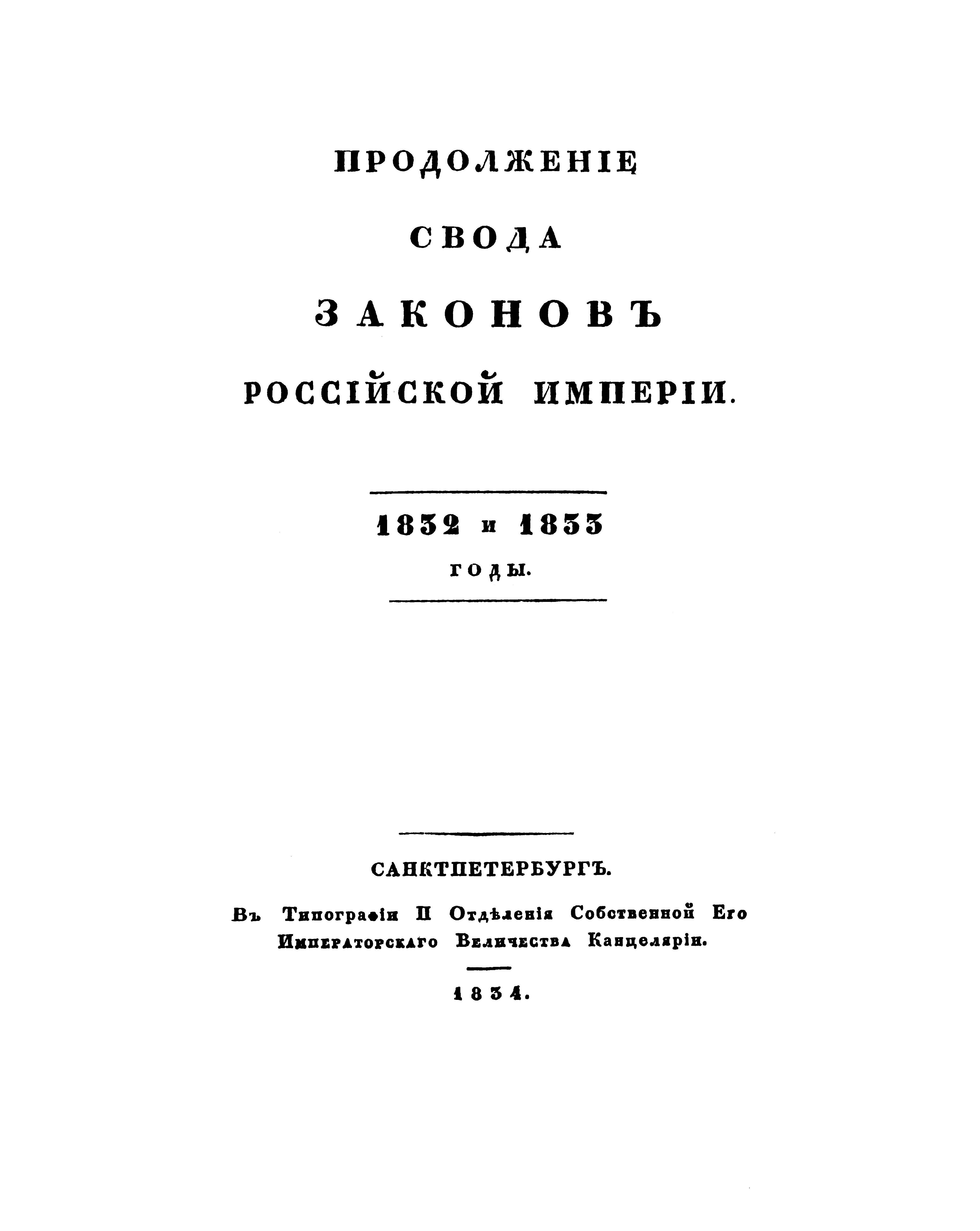 Продолжение Свода законов Российской империи.